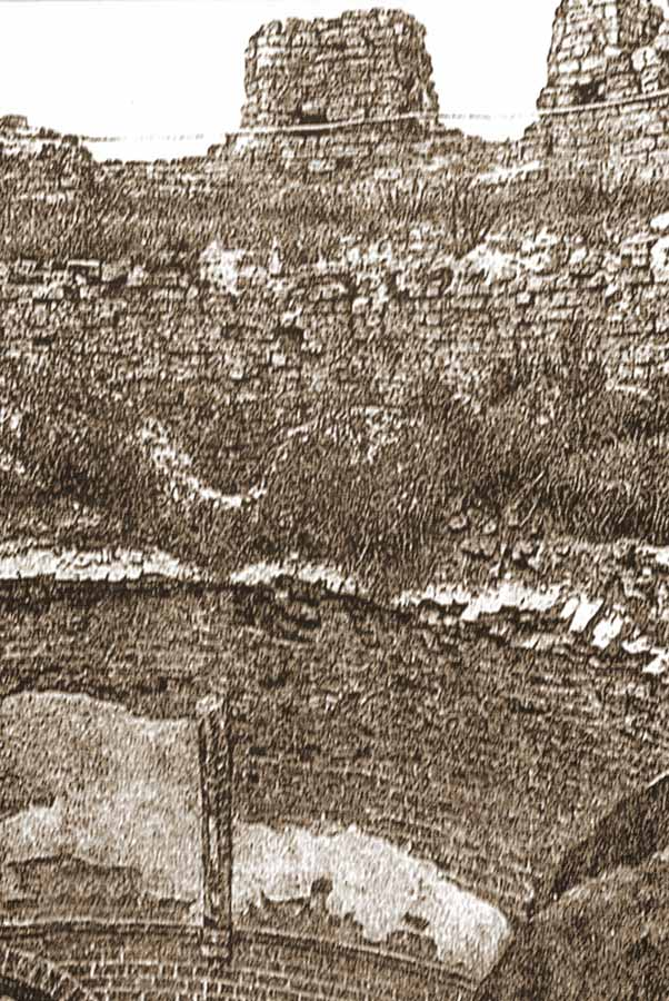 Беларуская (тарашкевіца): Камянецкая вежа